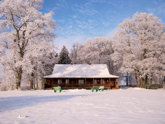 Выява сядзібы Францішка Багушэвіча зімой. Фота з сайта Дзяржаўнага музея гісторыі беларускай літаратуры.